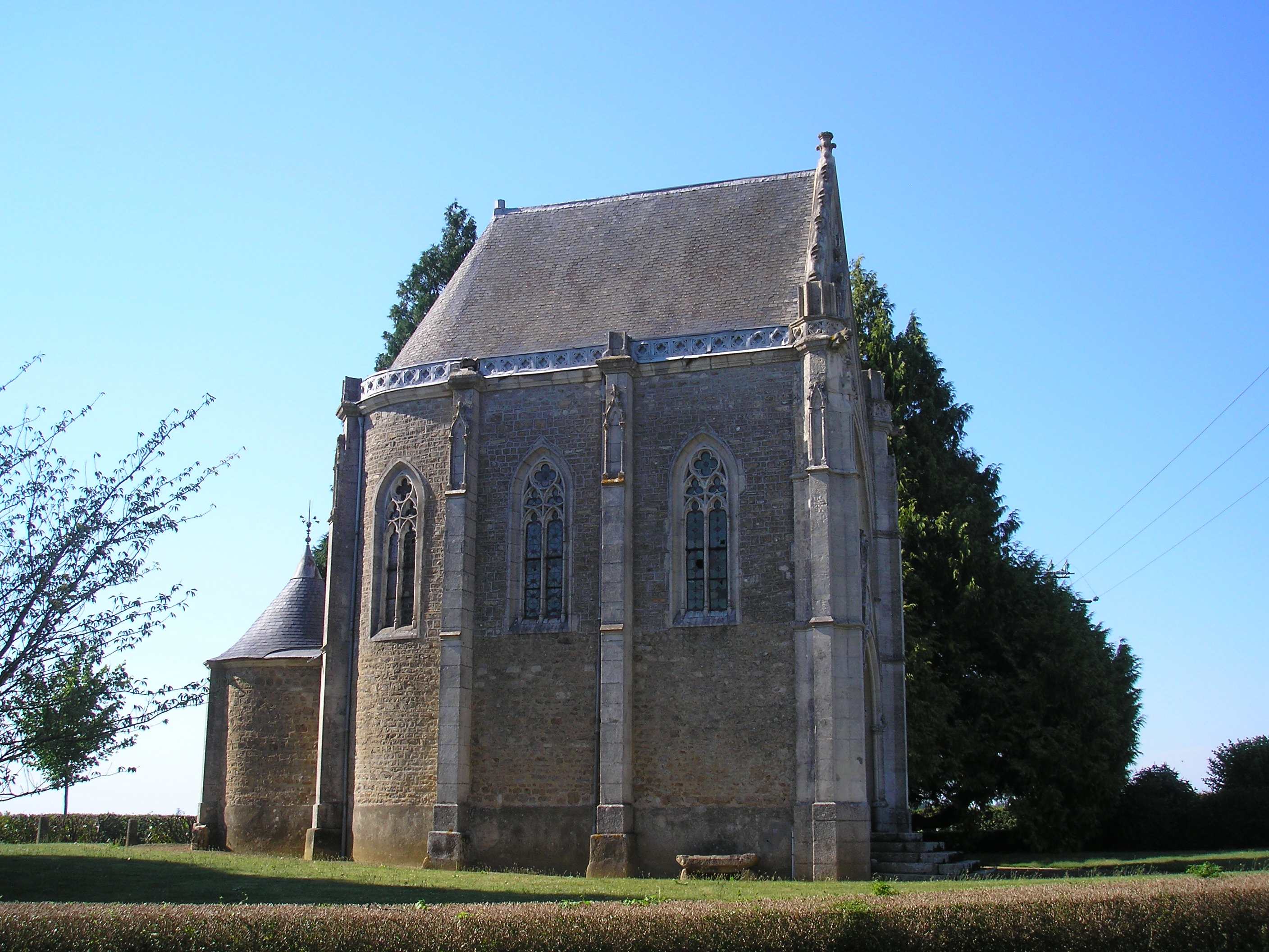 Lignières-Orgères (Pays de la Loire, France). La chapelle Notre-Dame-de-Lourdes.